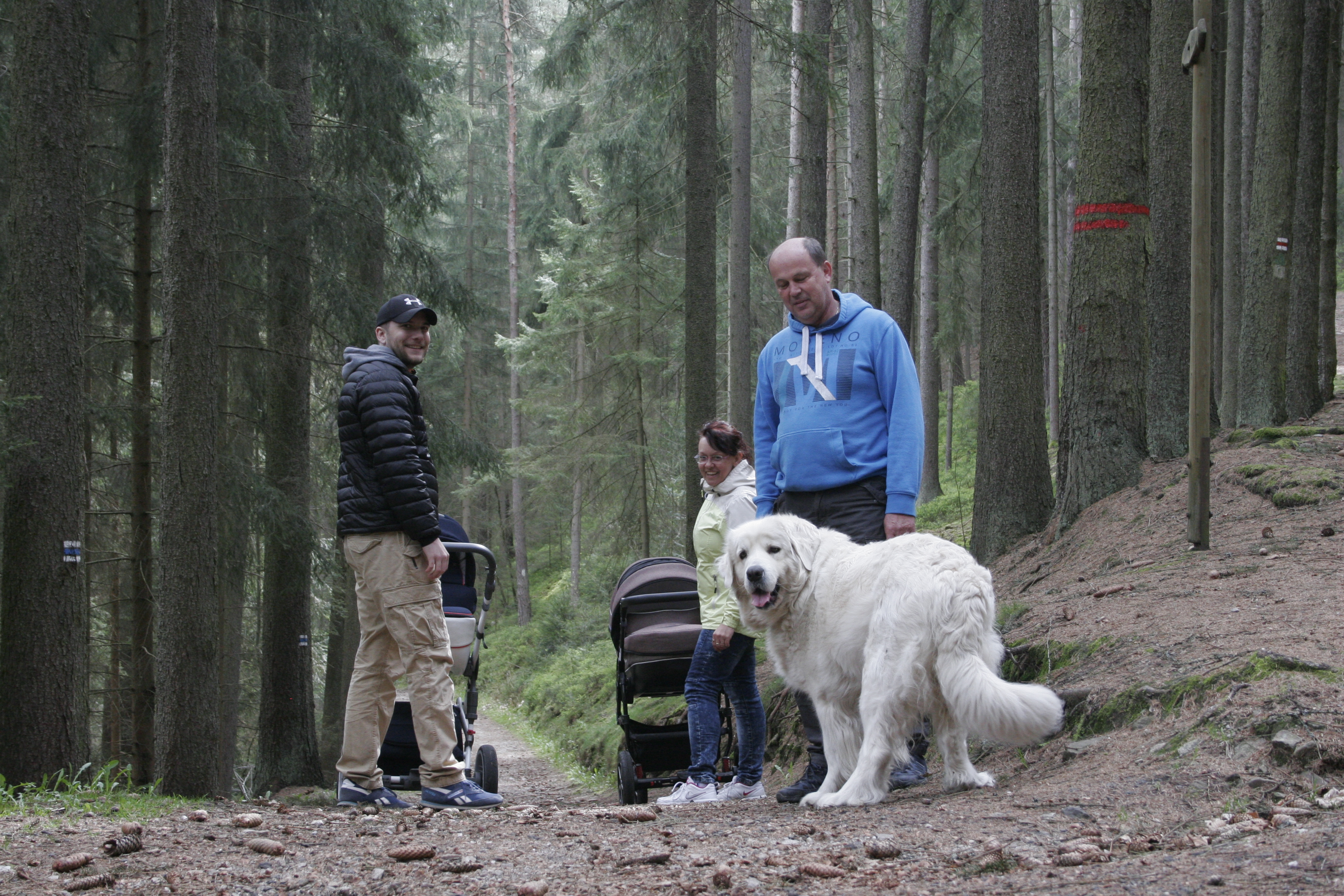 Přírodní rezervace Borek u Velhartic. Okres Klatovy, Česká republika.